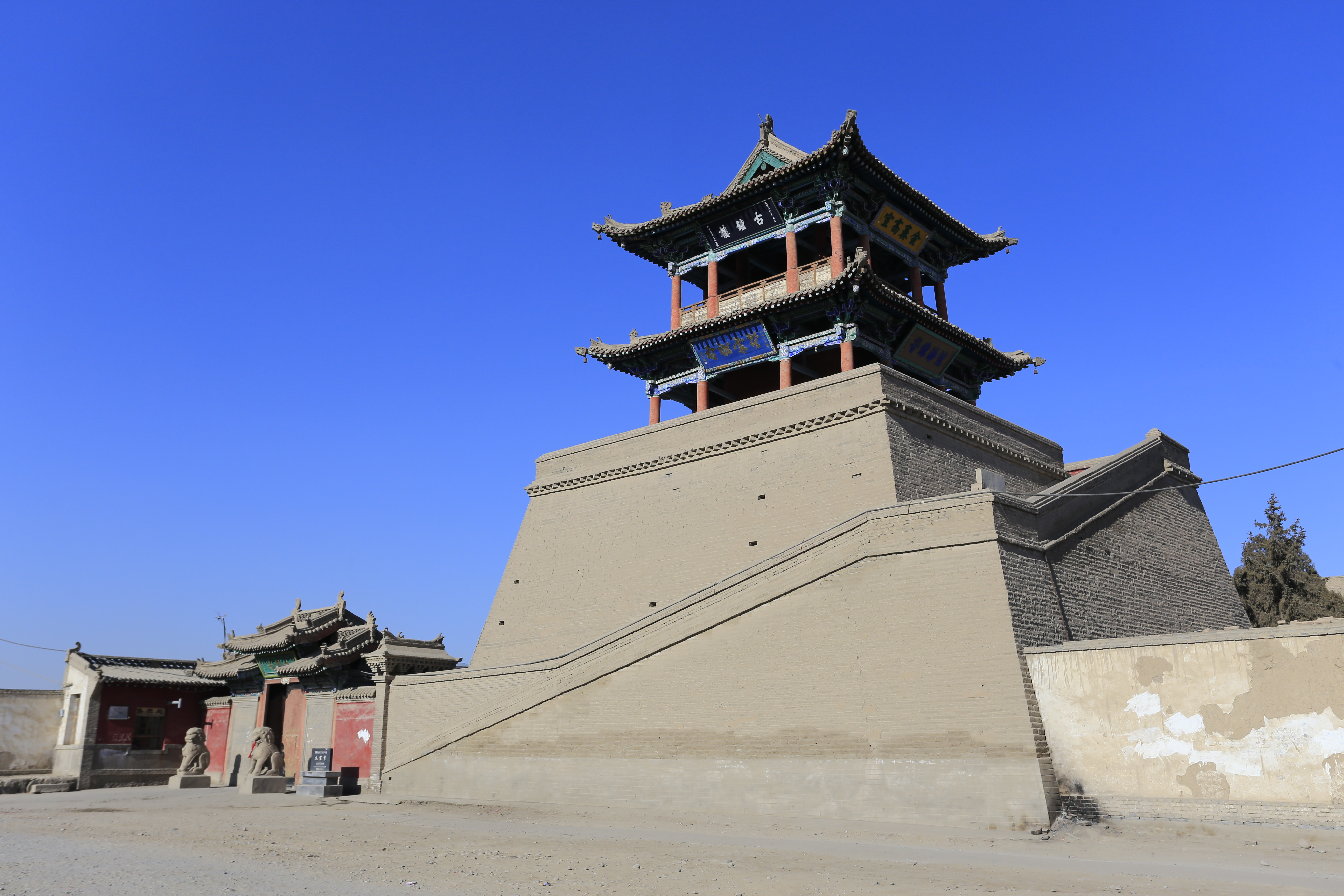 武威大云寺